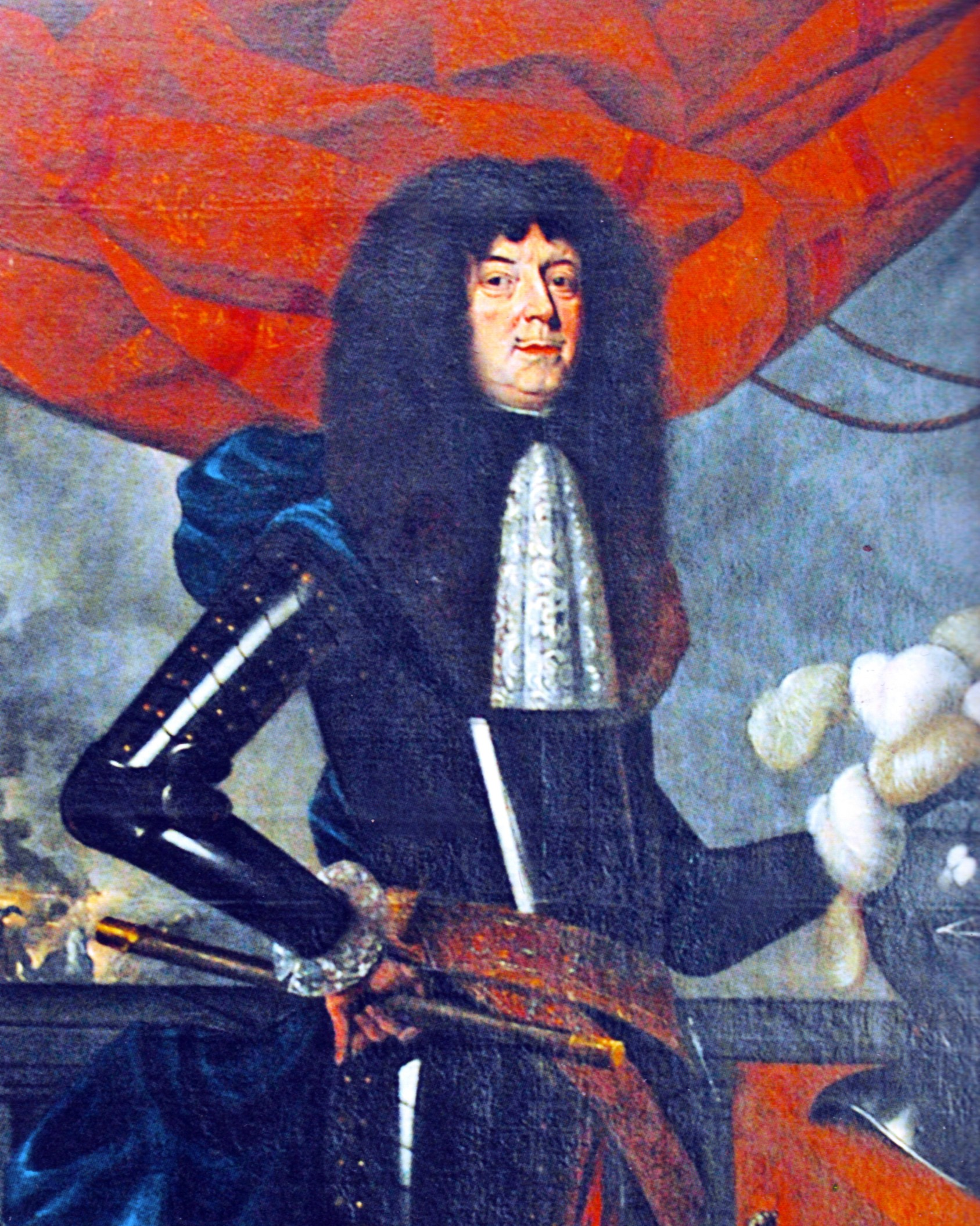 Daniel Dietrich von Landsberg zu Erwitte (1618-1683), unbekannter Künstler, Öl auf Leinwand (280x200cm)